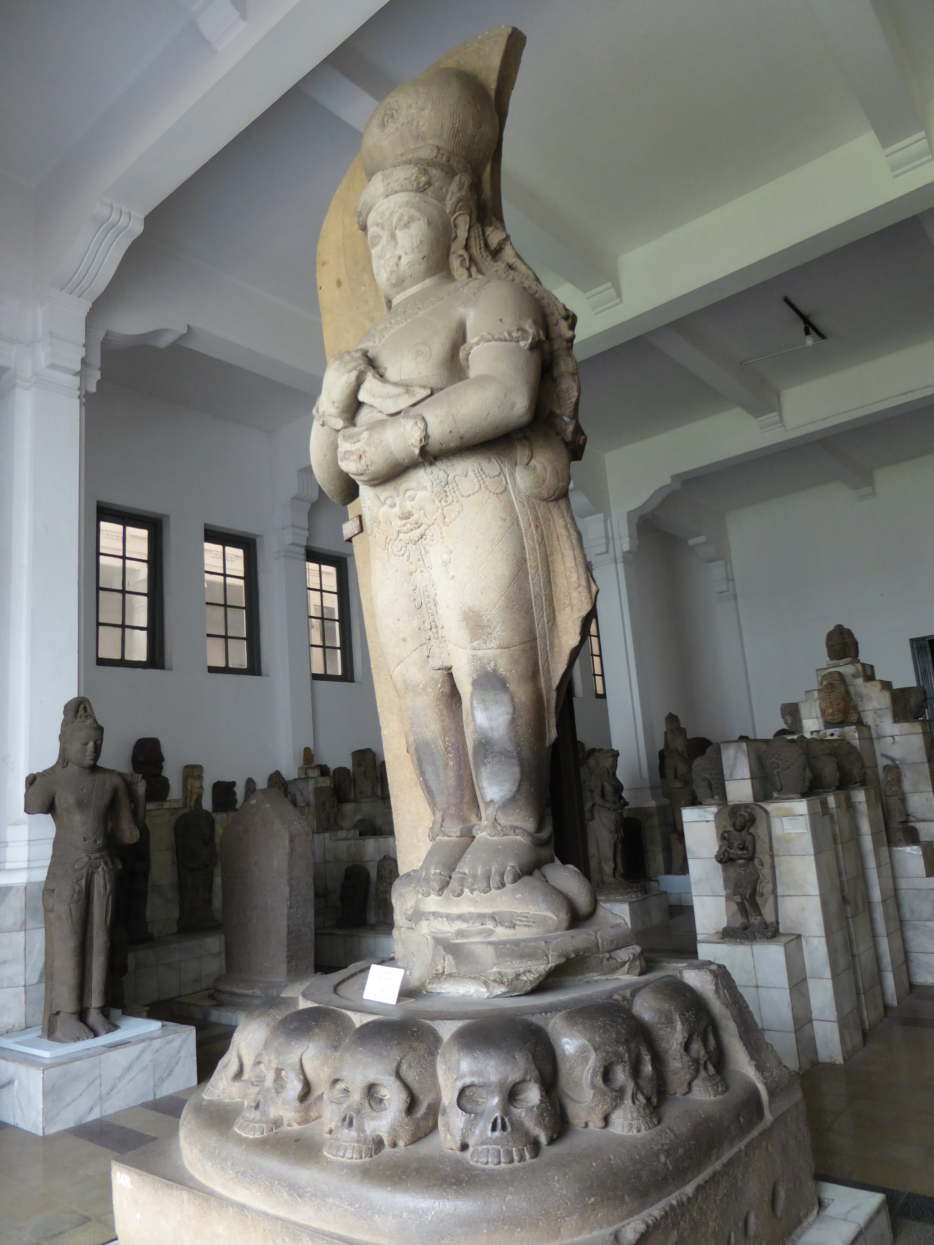 055 Bhairawa Adityavarman, Padang Roco, West Sumatra, 14th c, National Museum, Jakarta, Java